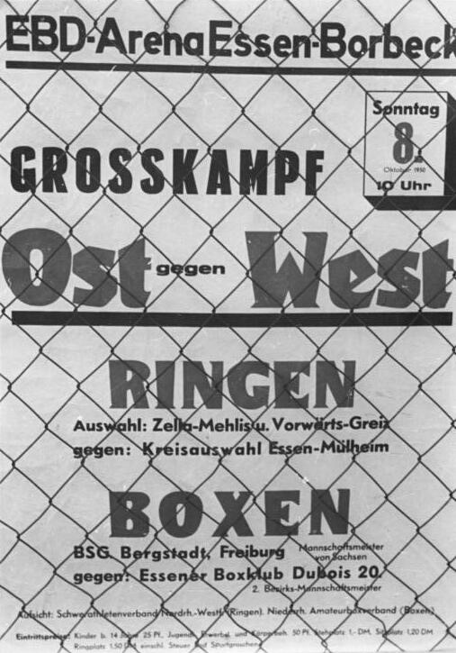 This description has been identified as biased or incorrect: DDR-PropagandaVeranstaltungsplakat, Boxkamp, Ringkampf Illus Aze 24.10.50 Freundliche Sport-Beziehungen mit Westdeutschland.Trotz aller Schikanen der Westalliierten und ihrer "Bonner Regierung" halten die Sportler von Ost und West freundschaftliche Beziehungen aufrecht. Am 8.10.50 weilte eine aus Ringern von Zella-Mehlis und "Vorwärts" Greiz und den Boxern von "BSG Bergstadt" Freiberg (Mannschaftsmeister von Sachsen) zusammengesetzte Mannschaft in Essen. Sie kämpfte gegen die Ringer-Kreisauswahl von Essen-Mülheim und den Essener Boxclub Dubois 20. UBz: Die Ankündigung des Treffens. (Es heisst darin irrtümlich Freiburg statt Freiberg).